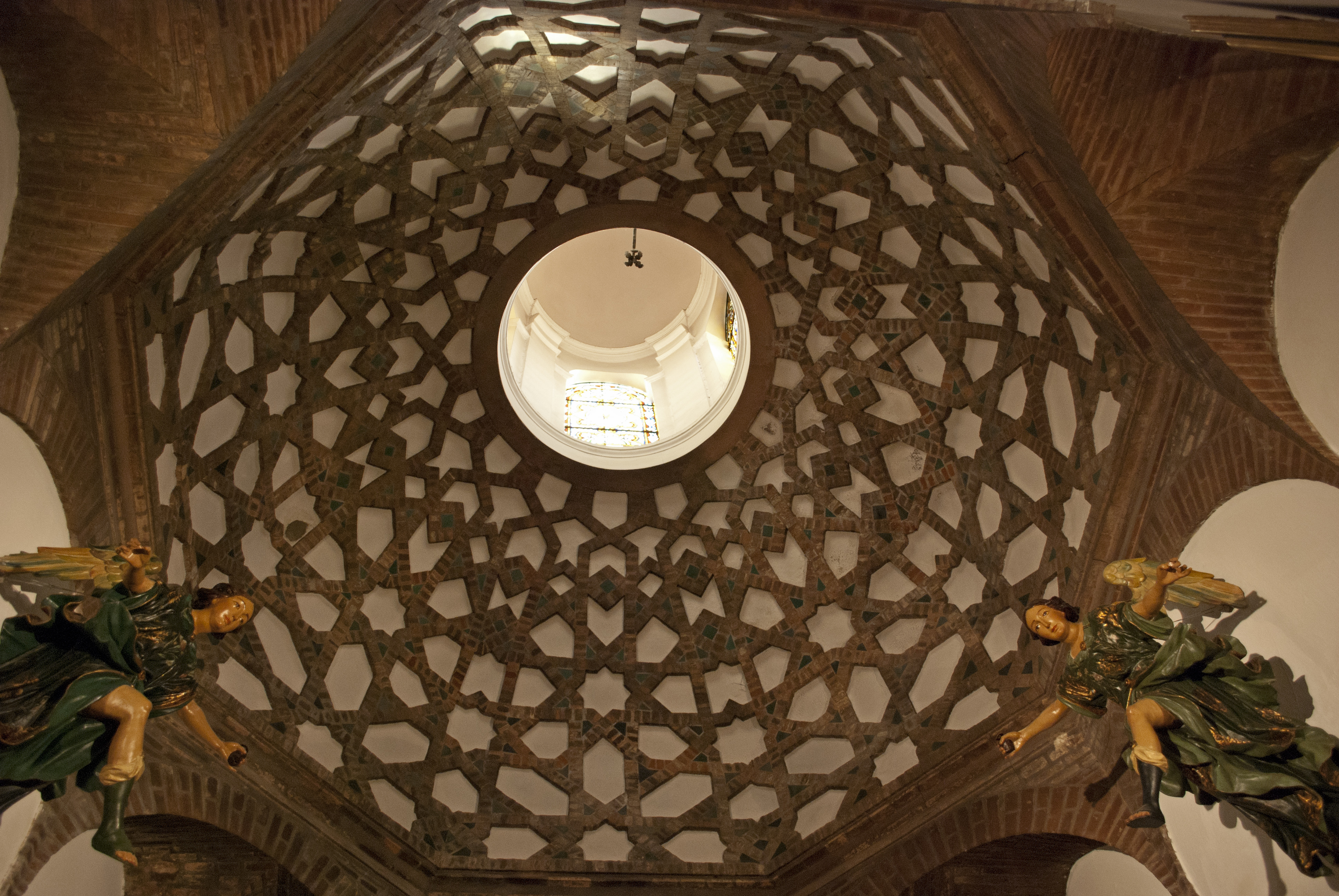 Bóveda mudéjar de la capilla sacramental de la iglesia de San Pedro, Sevilla.